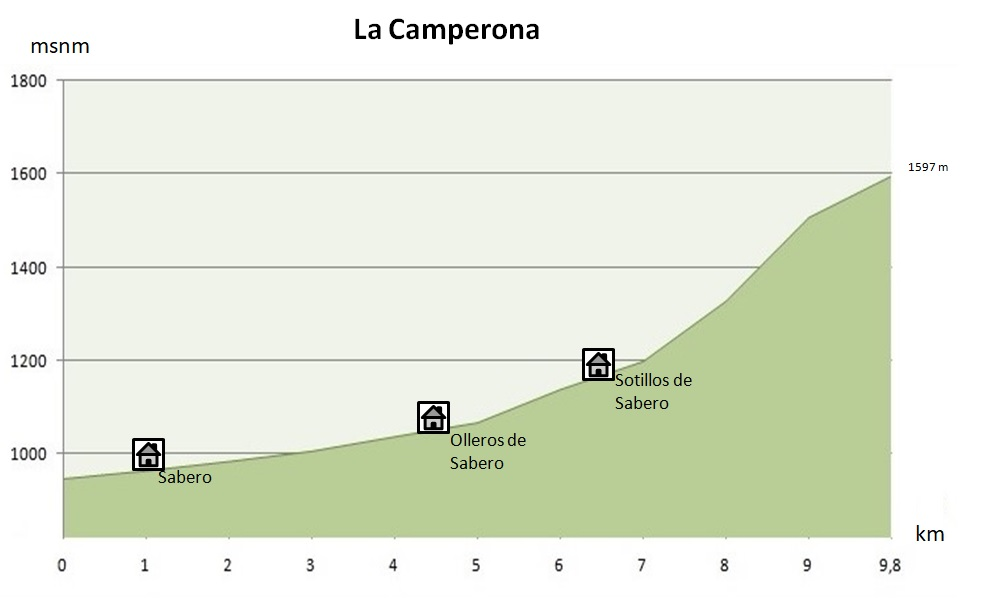 Perfil altimétrico del puerto de La Camperona, en Sabero, León (España)